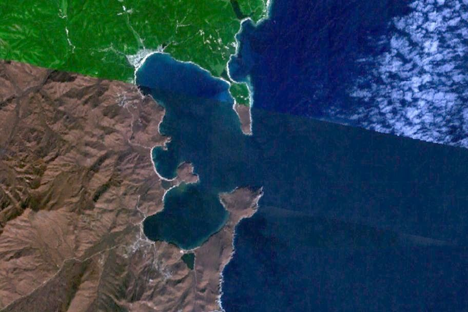 Залив Владимиоа, Японское море, Приморский край.